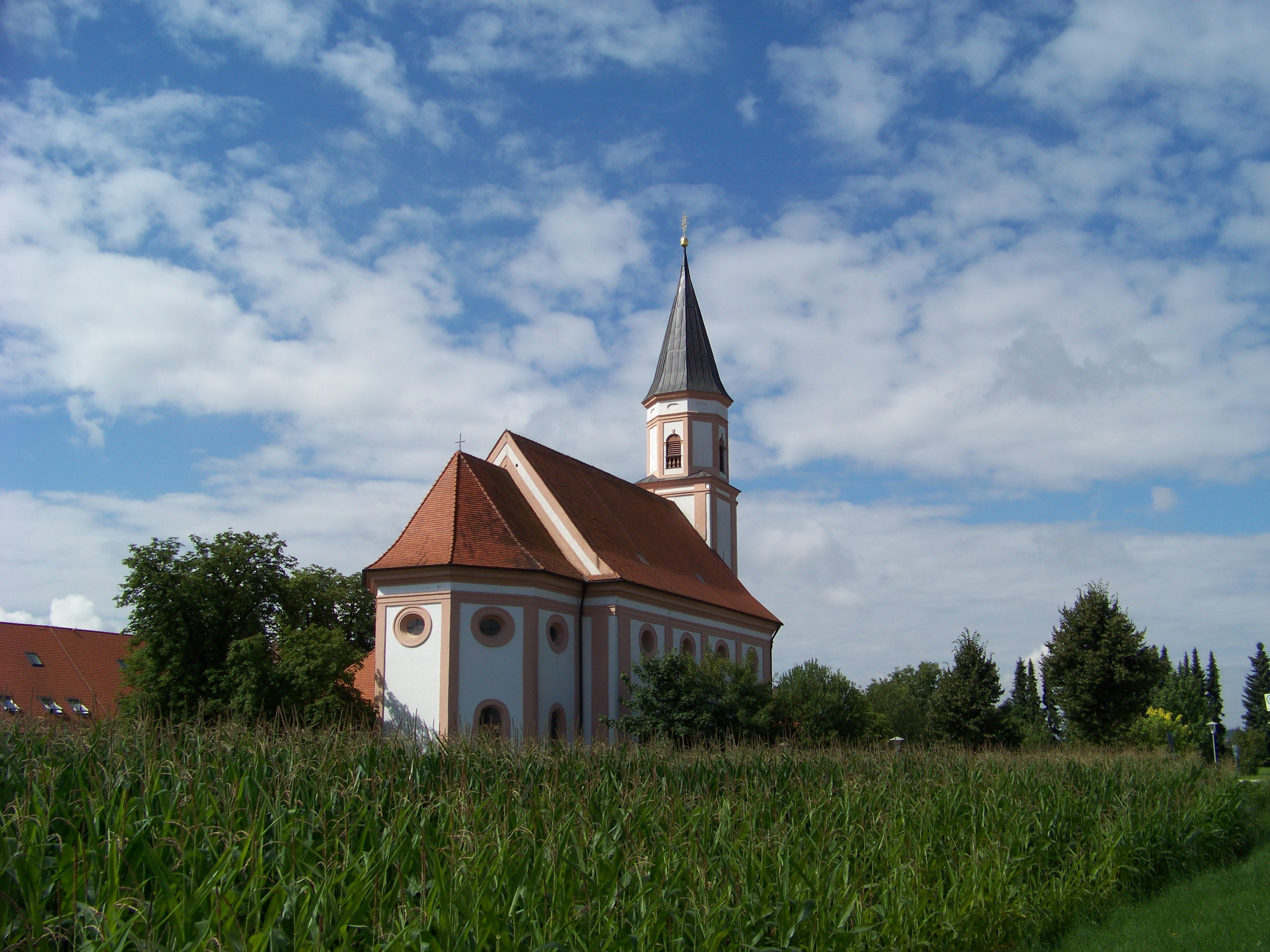 Hohenthann, Heiligenbrunn. Wallfahrtskirche Mariä Heimsuchung. Barockbau von Hans Widtmann, 1712/14; mit Ausstattung.